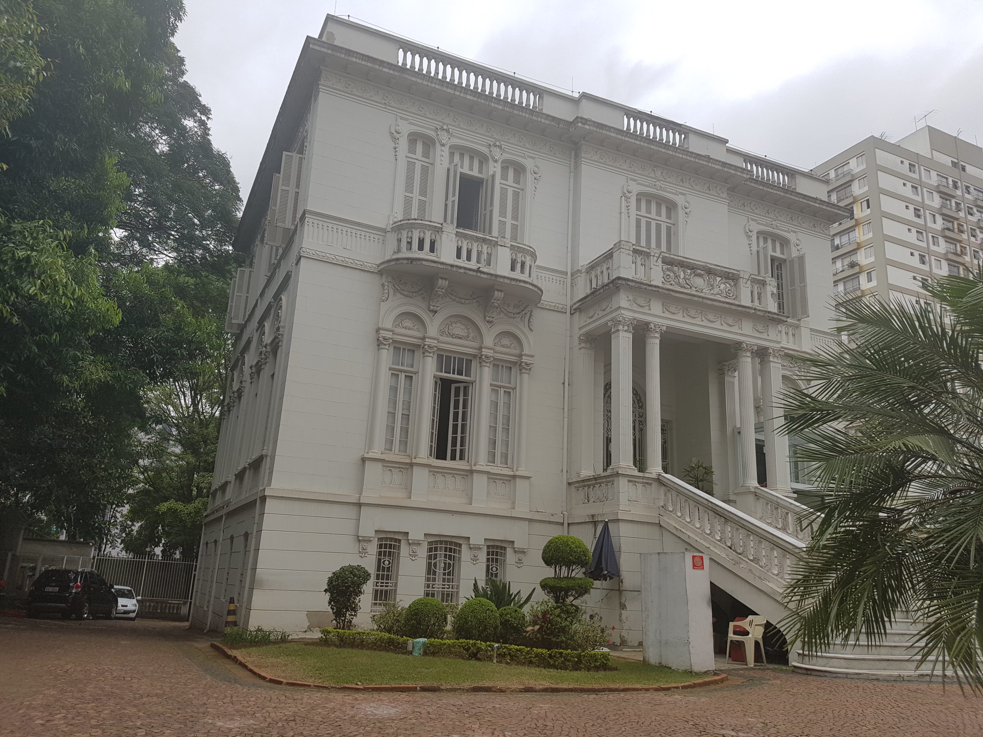 Parte frontal à esquerda da residência da Família Jafet localizada em São Paulo (SP), na Rua Costa Aguiar, 1055, Brasil.